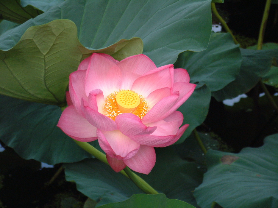 Nelumbo nucifera